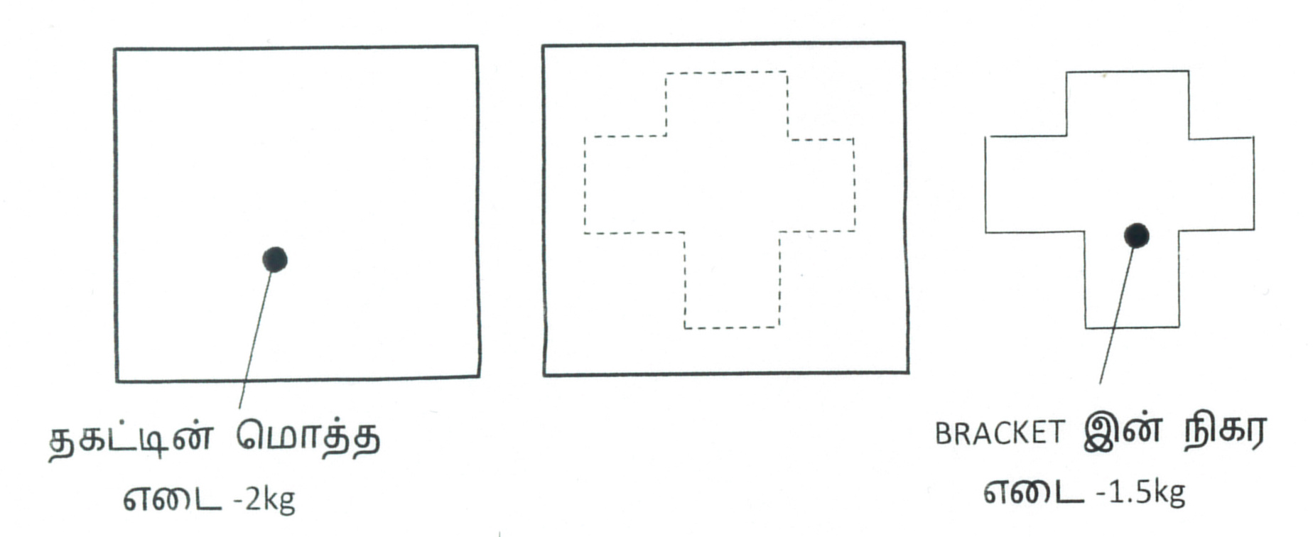 BRACKETகள் வடிவமைப்பு